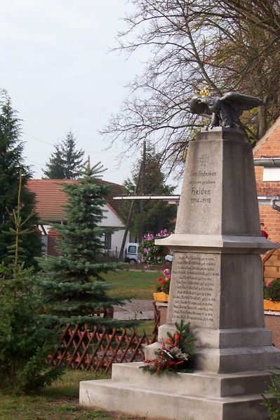 Kriegerdenkmal in Stendell